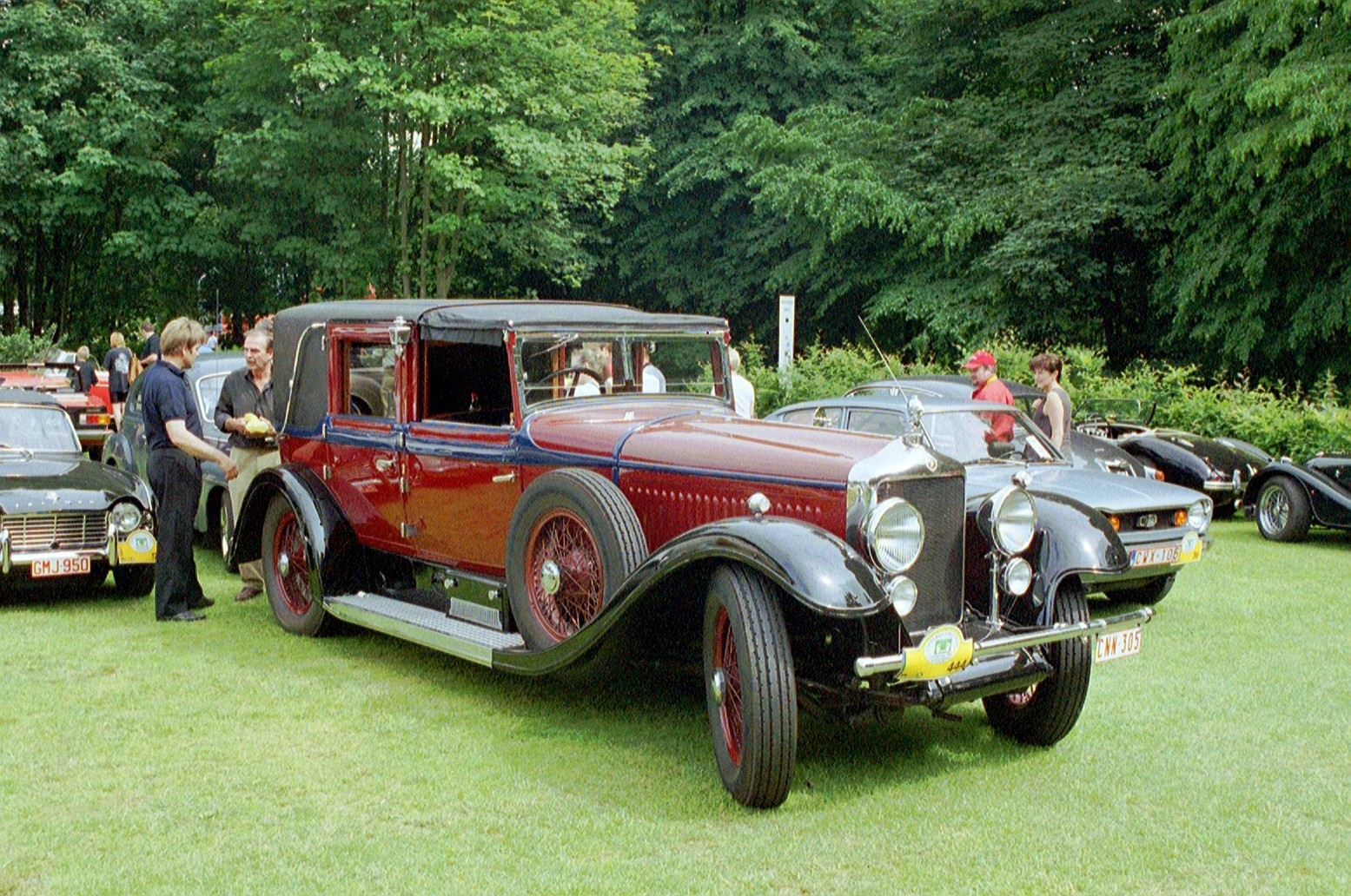 Eigen genomen foto